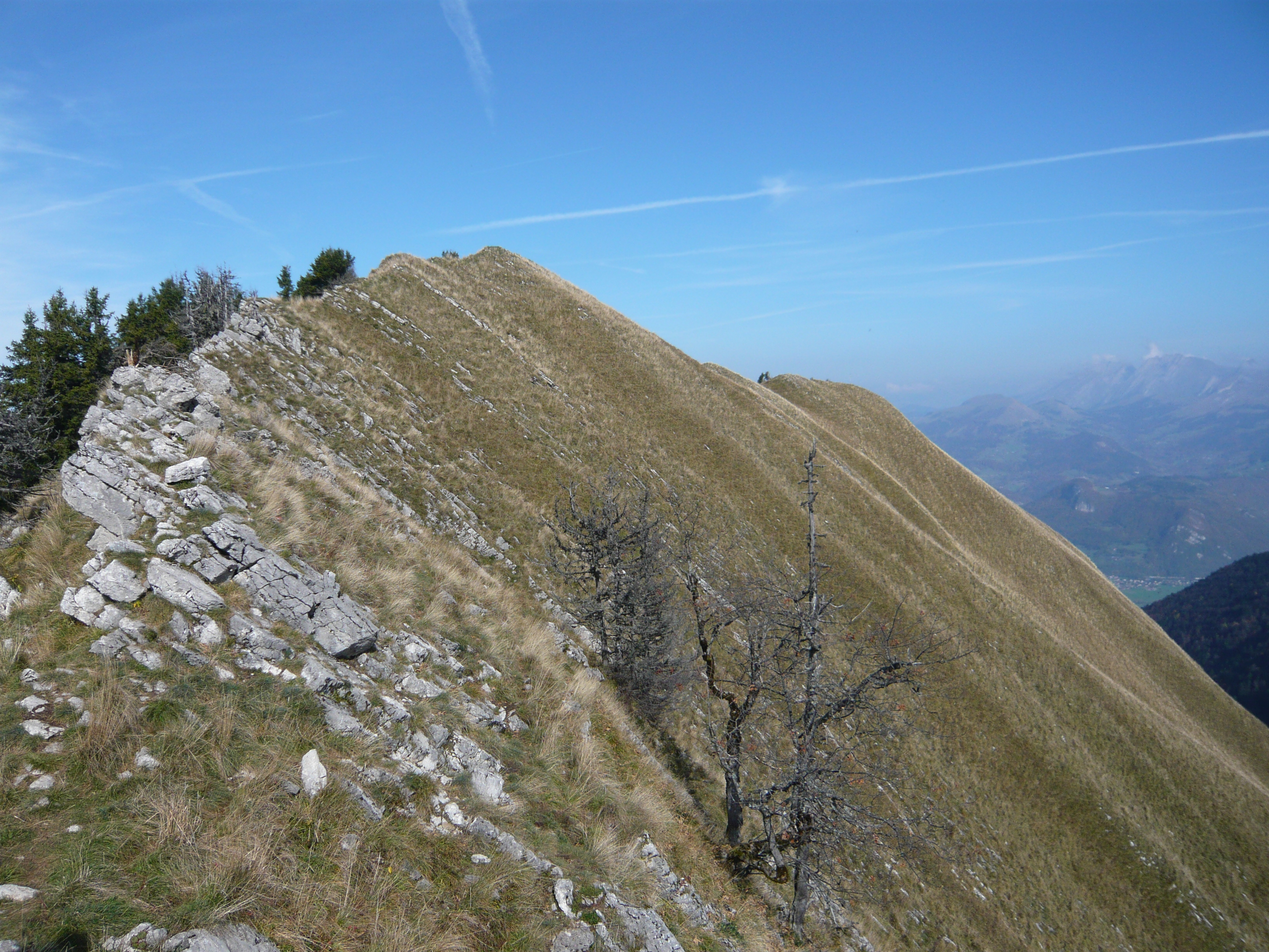 Sommet de la Pointe de Vélan